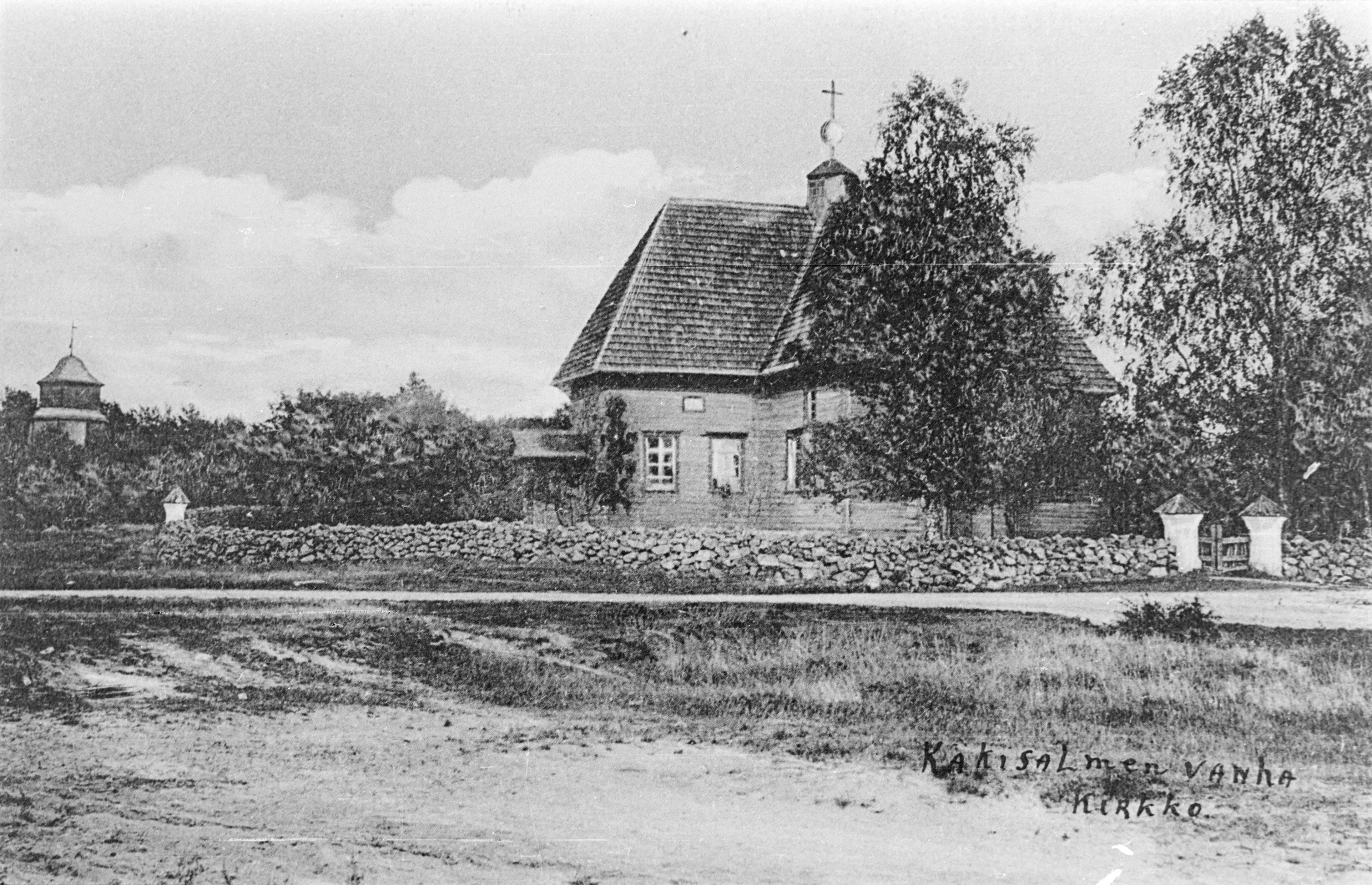 Kirkonrakentaja Tuomas Suikkasen johdolla vuonna 1759 valmistunut Käkisalmen vanha kirkko, kirkko oli pyhitetty Pyhälle Andreakselle. Venäläiset polttivat kirkon vetäytyessään jatkosodan alussa 1941.